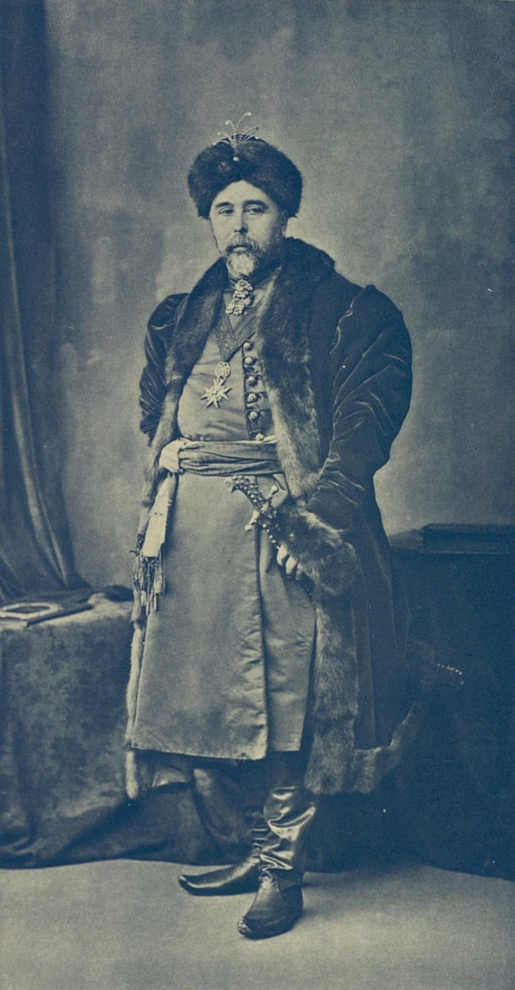 Егермейстер, Граф Сергей Дмитриевич Шереметьев, в наряде фельдмаршала Графа Бориса Петровича Шереметьева с портрета, хранившегося в селе Кускове.